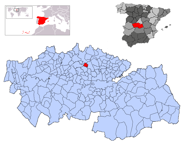 Portillo de Toledo en la provincia de Toledo